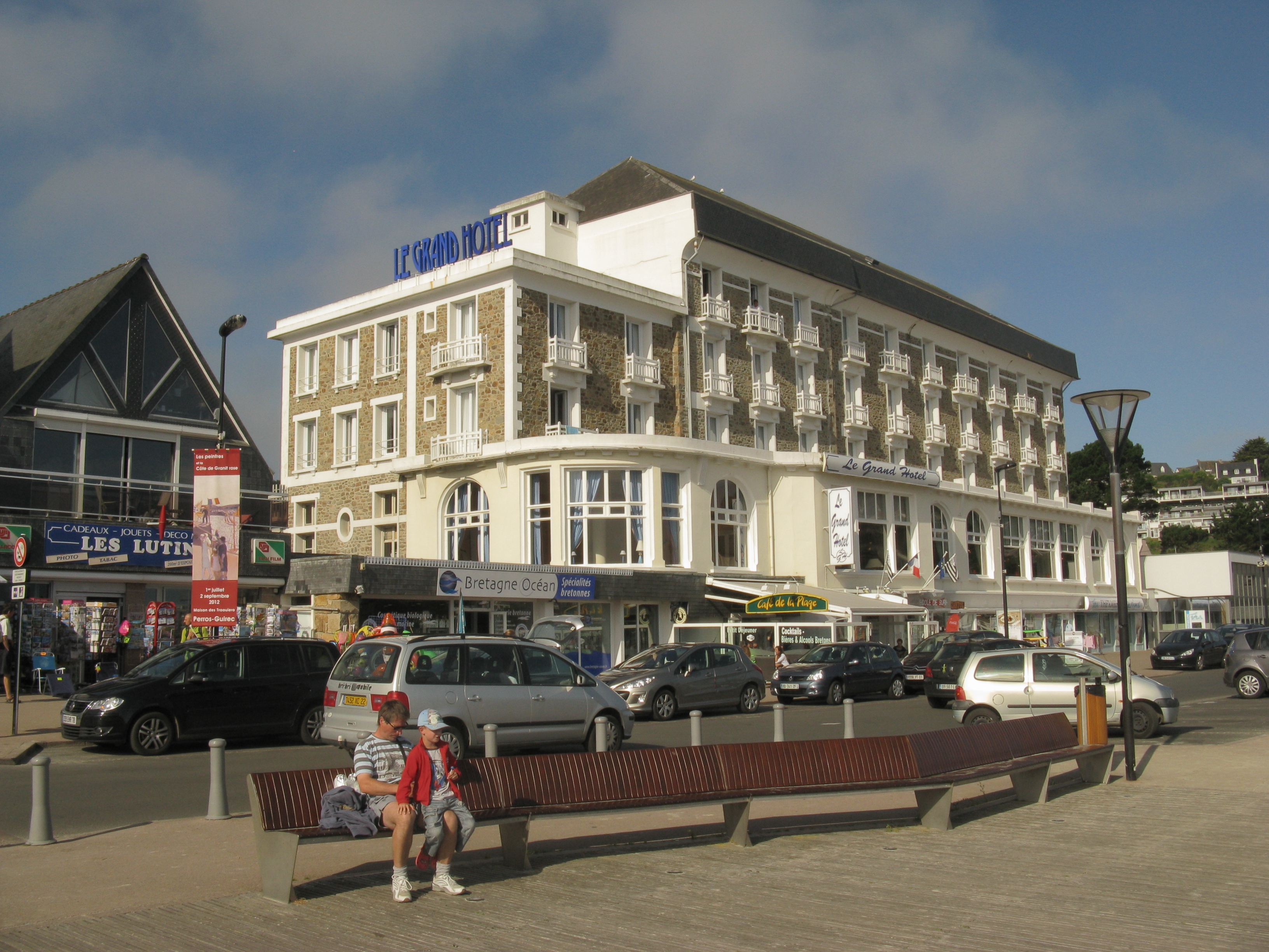 Grand Hôtel de Trestraou, Perros-Guirec